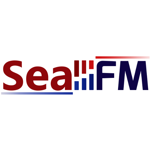 Sea FM Radion logo